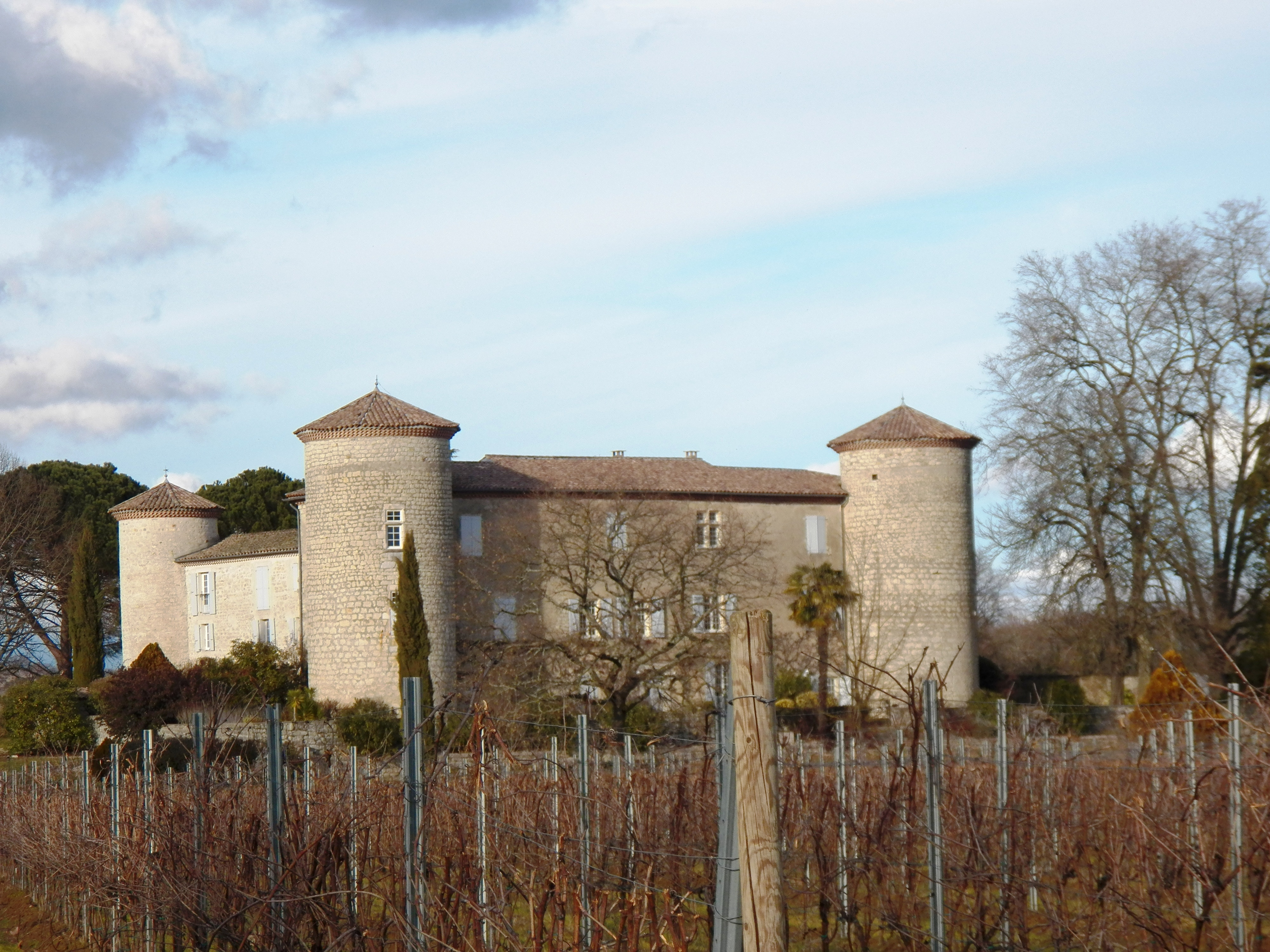 Bastide du XV ème siècle, ancienne propriété des ducs de Joyeuse